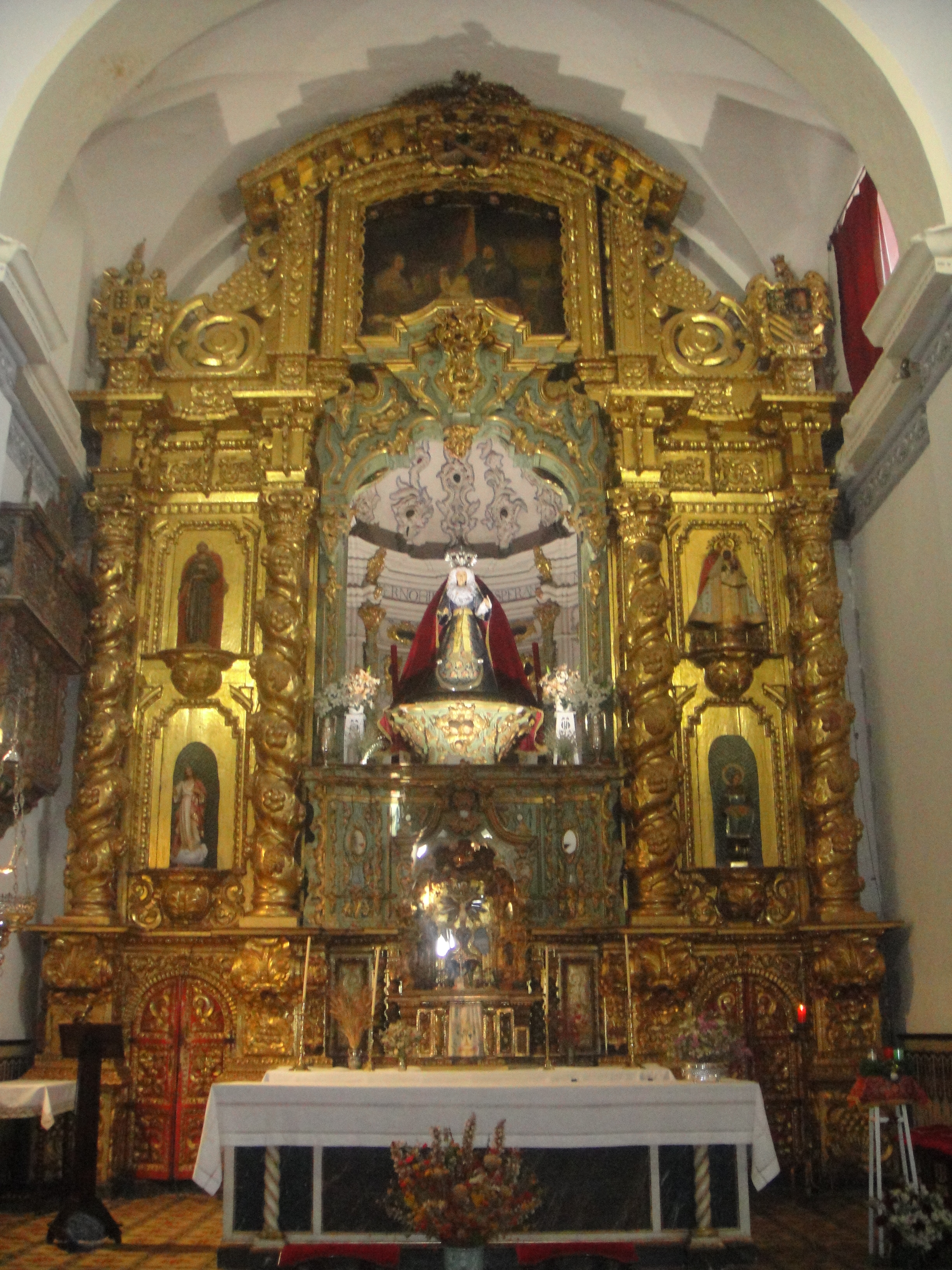 Retablo mayor de la iglesia de San Francisco de Fuente Obejuna, provincia de Córdoba, (España).